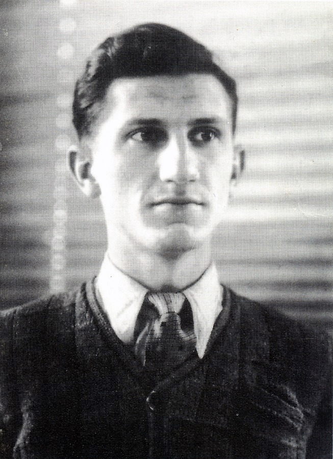 Povilas Butkevičius medicinos studentas.